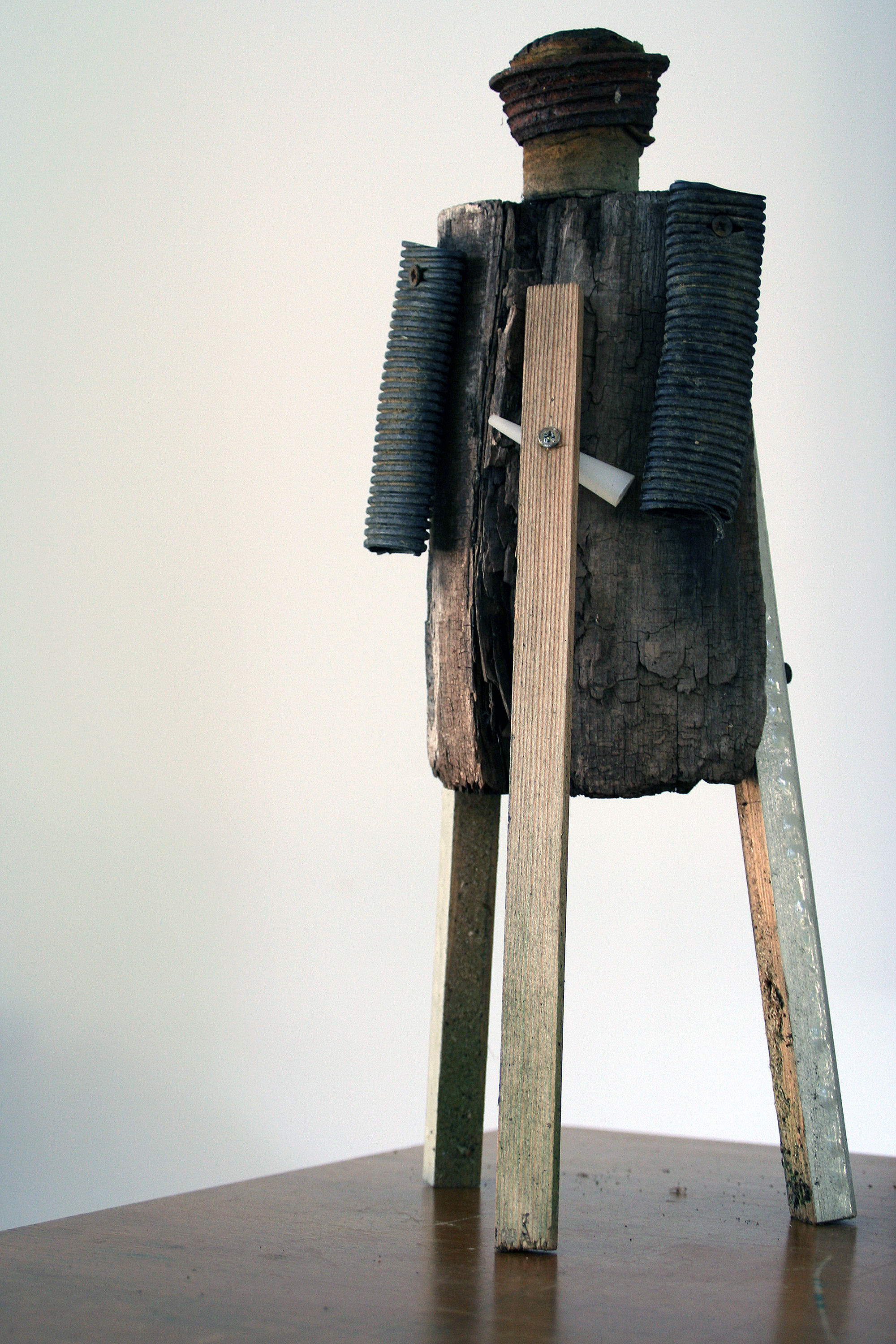 Ein Objekt von Reiner Zitta "Foerster" von 2015